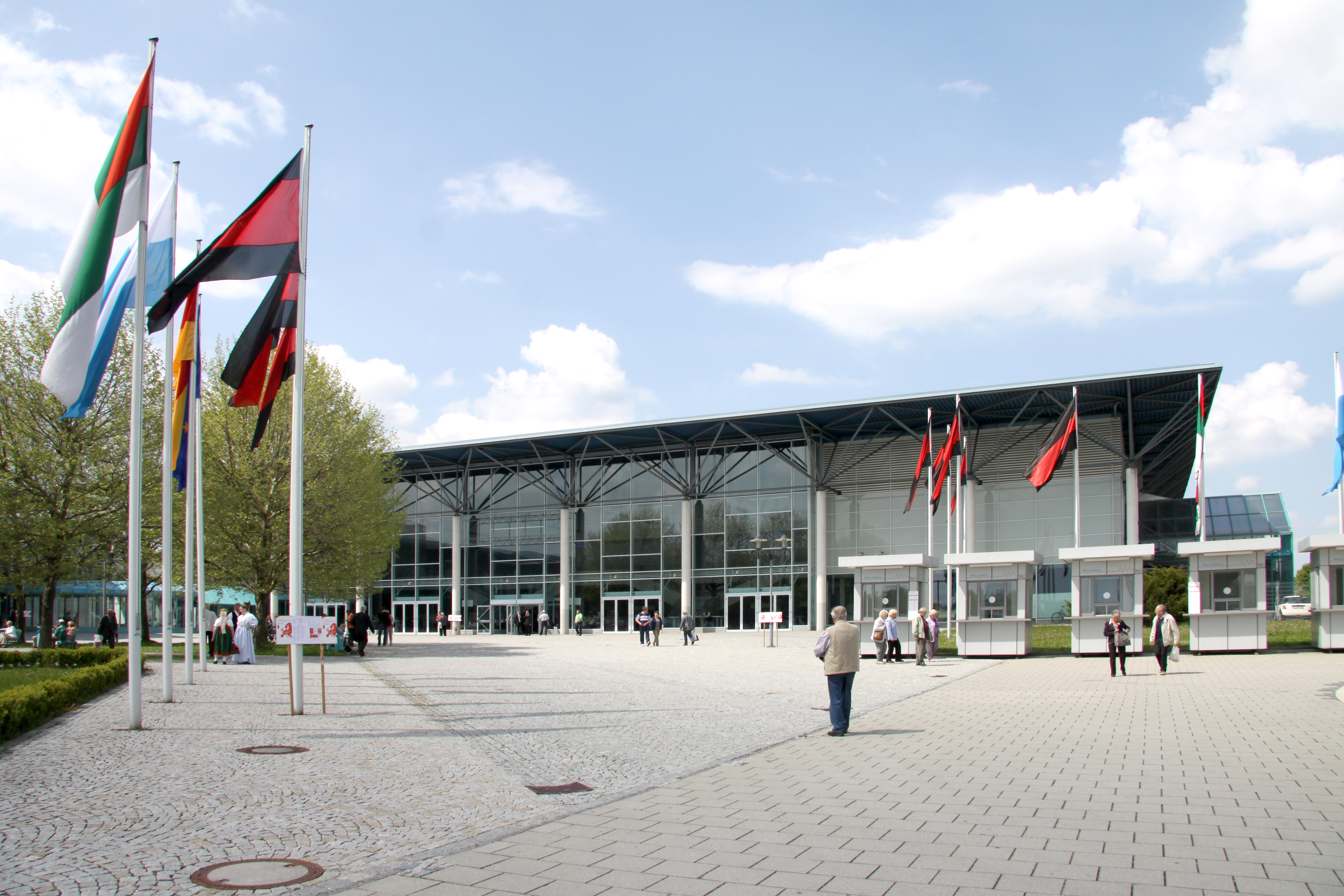 Messe Augsburg, Eingangsbereich, Sudetendeutscher Tag 2010